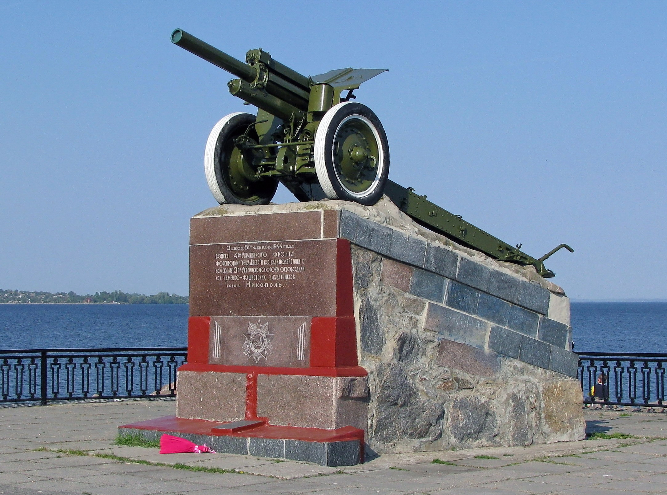 Памятник "Пушка" в Никополе в честь освобождения города от немецко-фашистских захватчиков